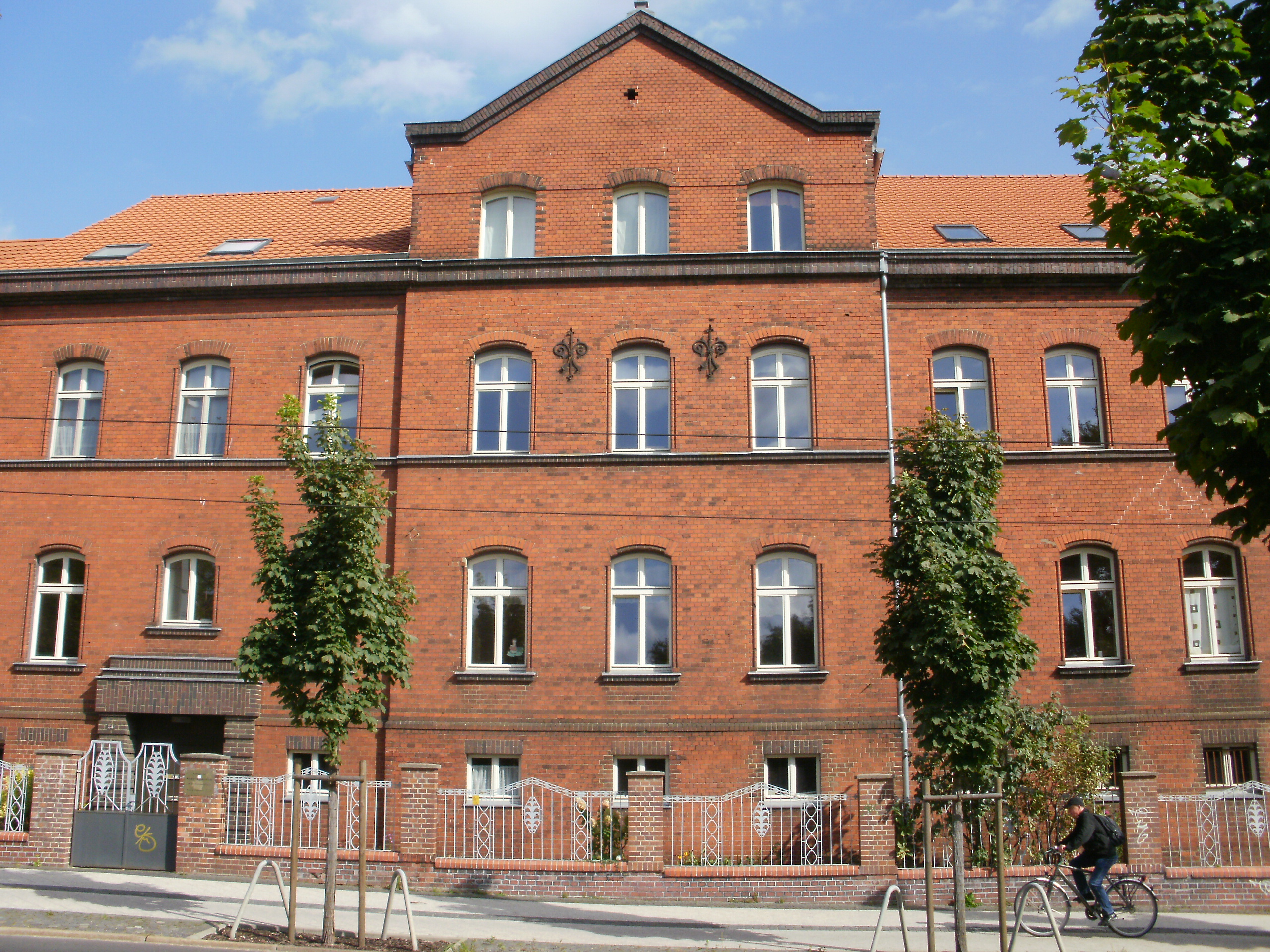 276. St.-Elisabeth-Haus